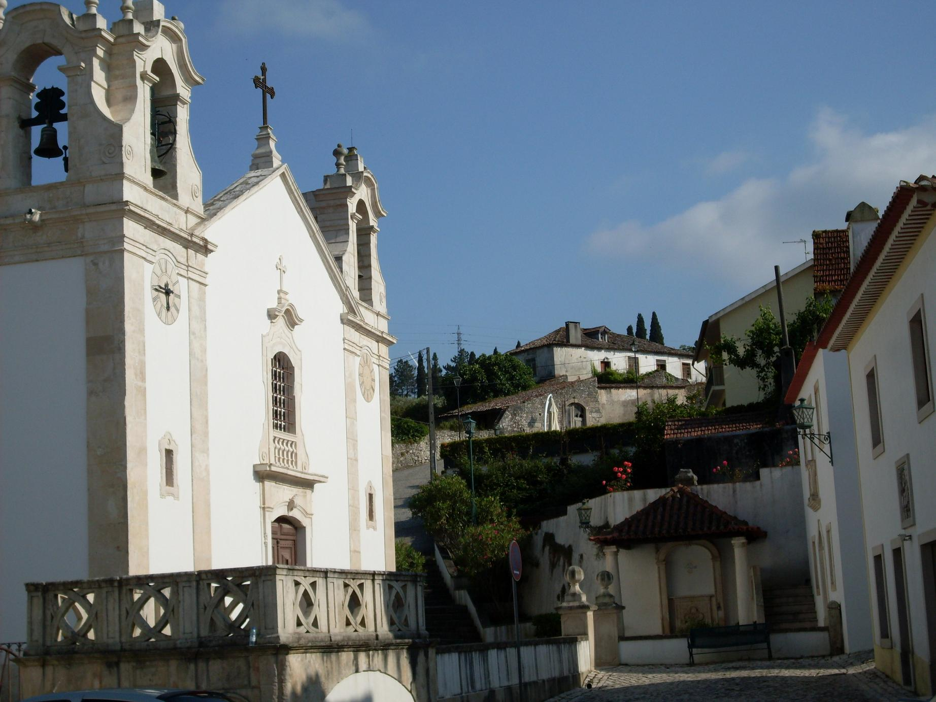 Igreja de Nossa Senhora dos Remédios, 2011, Reguengo do Fétal This file was uploaded for Wiki Loves Monuments in Portugal with the unique identifier 73020.